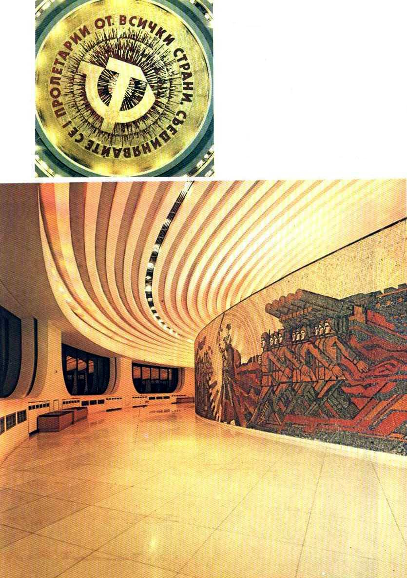 Бузлуджа